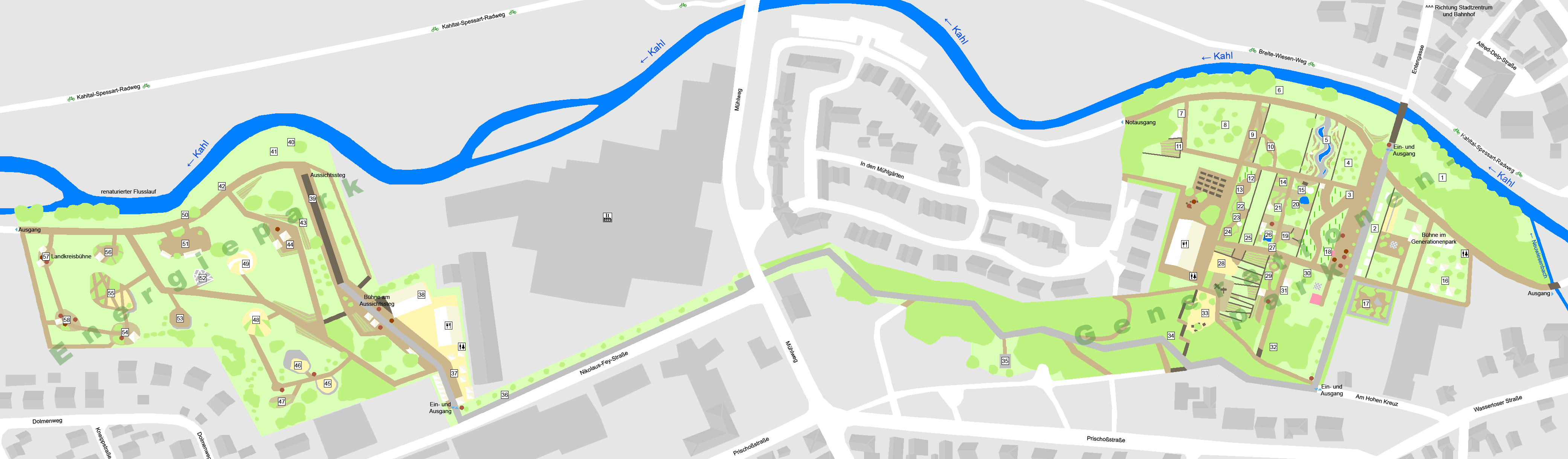 Geländeplan der Landesgartenschau in Alzenau Baum Wiese Weingarten Gewerbegebiet 1 Spiel- und Sportwiese 2 Bewegungsparcours 3 Wein- und Rosengarten 4 Obstlounge 5 Kneipp-Anlage 6 Hörsteiner Patenbank 7 Geflügelzuchtverein 8 „Schlaraffenland“ 9 Bibelgarten 10 Mustergrabanlage 11 Bayerisches Umweltministerium 12 Partnerstädte 13 Bücherbaum 14 „Neue Gartenräume“ 15 „Für besondere Lagen“ 16 Kirschgarten 17 „Garten mit allen Sinnen“ 18 Winzerpavillon 19 Baumschaukel 20 „Mit lebendigem Schwung“ 21 „Garten der sinnlichen Vielfalt“ 22 Winterharte mediterrane Bepflanzung 23 „Blütenträume“ 24 Baumschulbeitrag 25 Picknickecke 26 „Mit Wasser erleben“ 27 Gartendetails 28 Staudenpflanzung 29 Gartenoase Wasser Sand Gastronomie WC 30 „Luhmännchen“ 31 „Die Welt der Bienen“ 32 Kräuterspirale 33 „Kuckucksnest“ 34 Aussichtspunkt 35 Luftbild „Alzenau von oben“ 36 Kollergang 37 Garten- und Handwerkermarkt 38 Blumenschau 39 Aussichtssteg „Kahlaue“ 40 „Bäumchen-Wechsel-Dich“ 41 Insektenhotel 42 Historische Grenzsteine 43 Stauden des Jahres 2001–2015 44 Bayerisches Landwirtschaftsministerium 45 H2O-Garten 46 „Hai-Energie“ 47 „Energieparcours“ 48 Sonnenenergiegarten 49 „Windschiefer Garten“ 50 Baumspende der Partnerstadt 51 „Spessart -Das grüne Meer in der Region“ 52 „Hitziger Garten“ 53 CH4-Garten 54 „Destillat-Garten“ 55 „Flower Power“ 56 „Goldrausch“ 57 Landratsamt Aschaffenburg 58 Bund Naturschutz